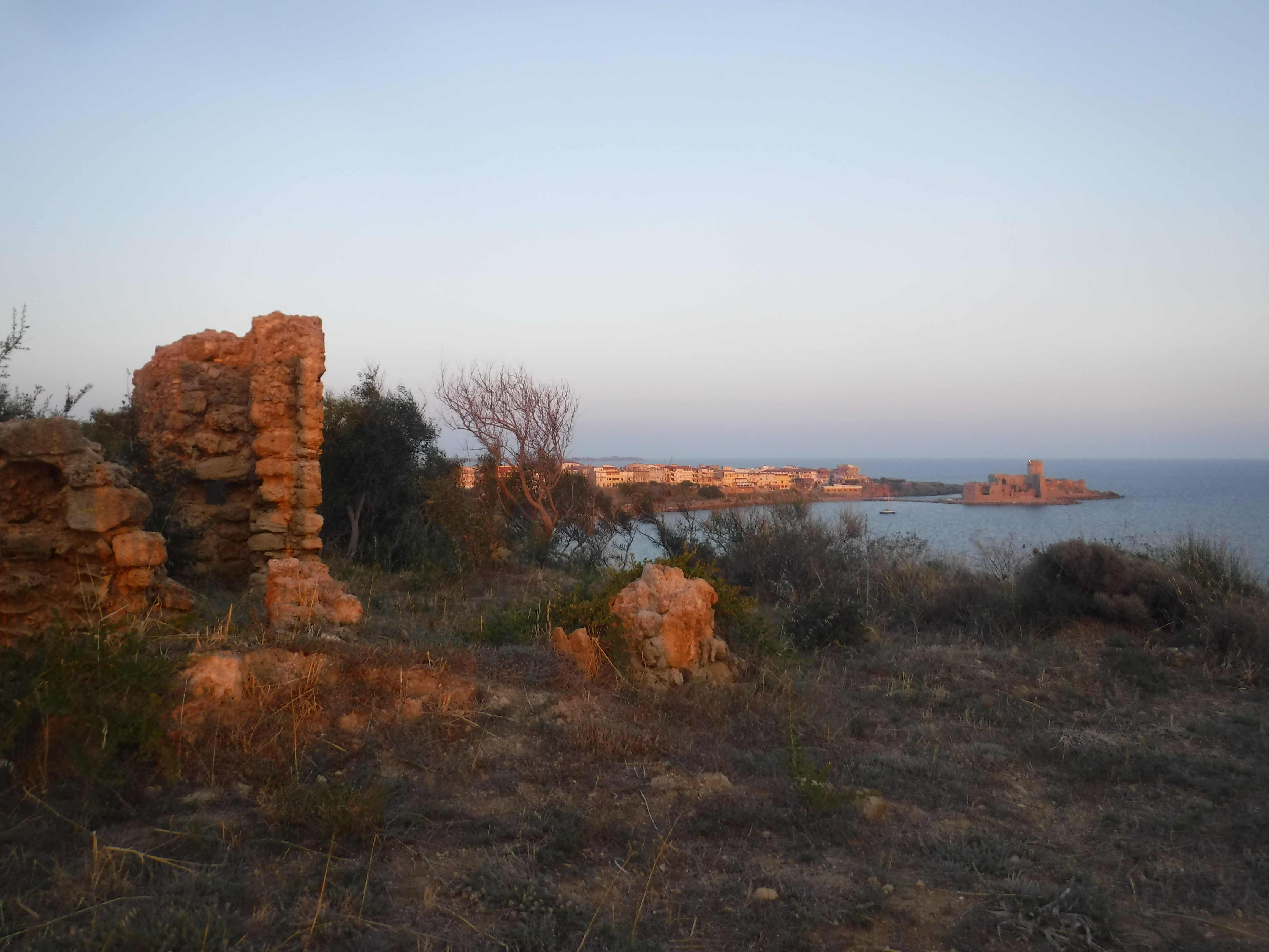 Parti del rudere della torre costiera ed in fondo il il paese di Le Castella con la sua fortezza.